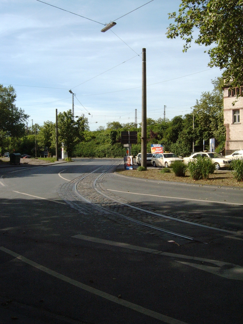 Überreste der Linie 320 vor dem Wittener Hauptbahnhof. Im Rahmen von Umbauarbeiten sind diese im Sommer/Herbst 2009 demontiert worden.